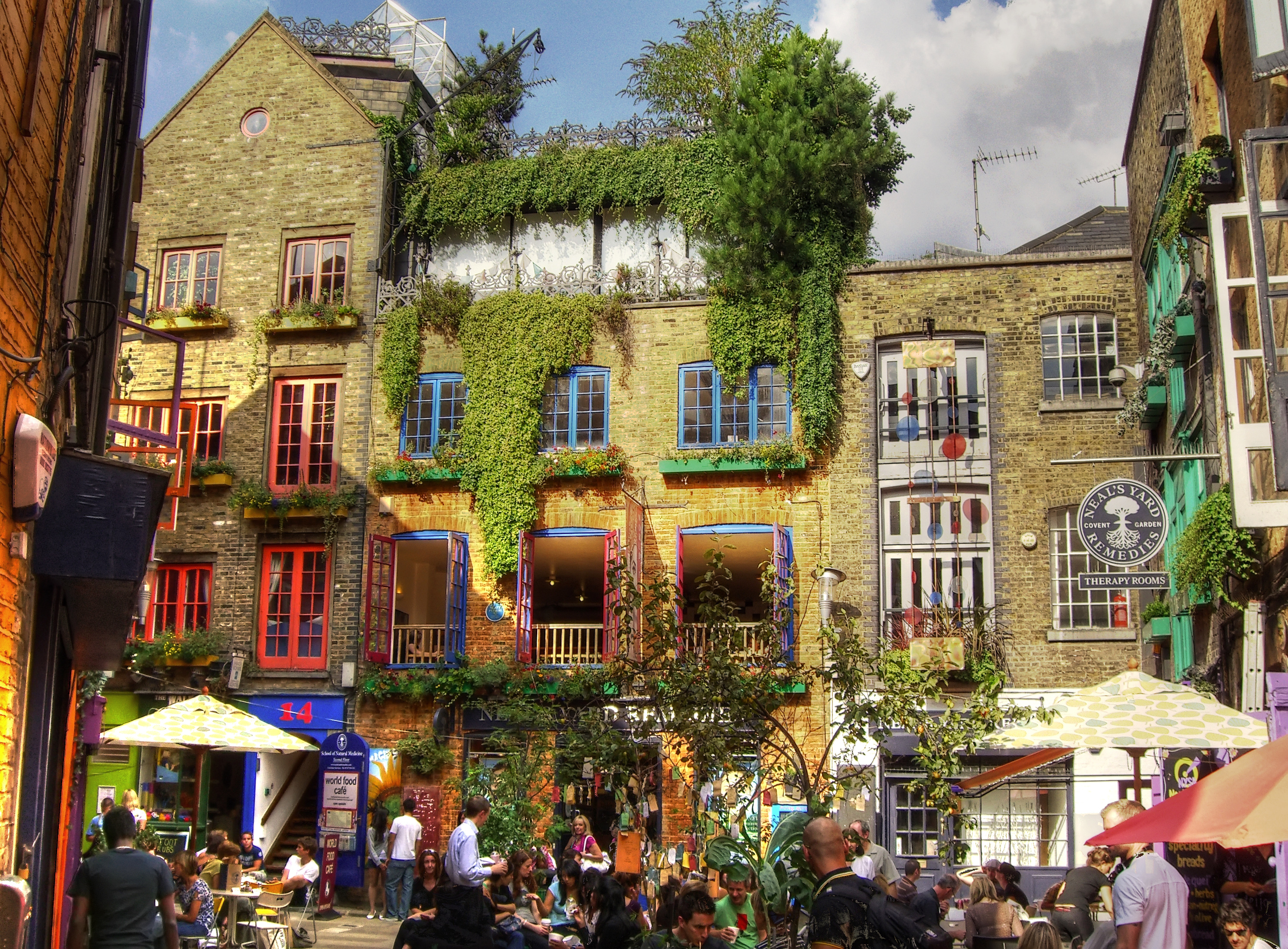 Encontramos este lugar siguiendo un post del blog de Andoni Munduate, MunduJr en flickr. Un Ataundarra con mucho mundo al que merece la pena seguirle. Nos acercamos a la tienda de quesos Neal's Yard Dairy, donde compramos un trozo de cheddar y unos botes de pickle de manzana casero (Slap&Pickle) impresionantes. En la misma tienda nos recomendaron amablemente visitar este pequen~o barrio escondido entre casas y la cafeteri'a Monmouth. Todo salio' perfecto. featured in